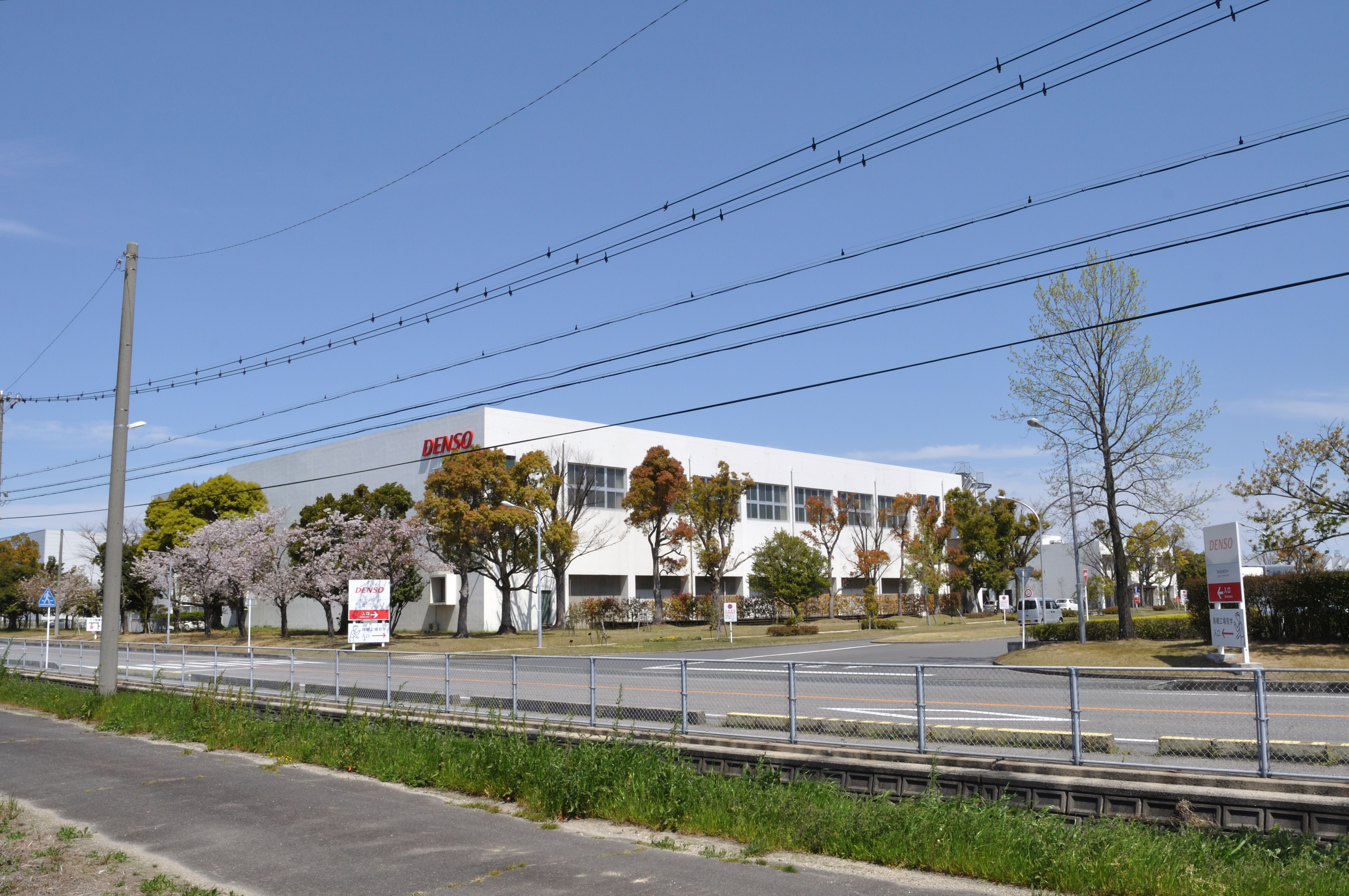 デンソー高棚製作所の外観画像